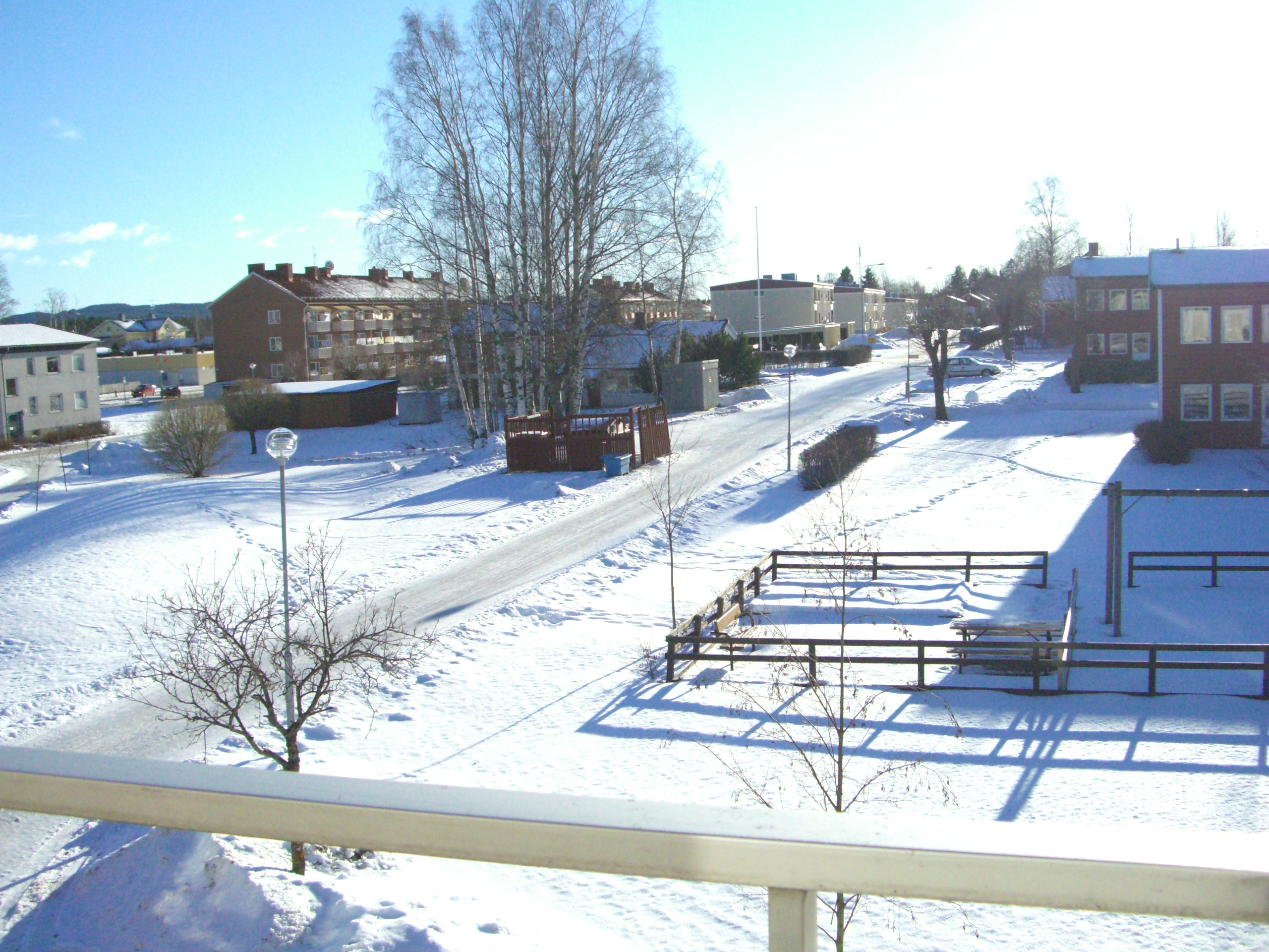 Åsparken; Arbrå; Bollnäs, Sweden.